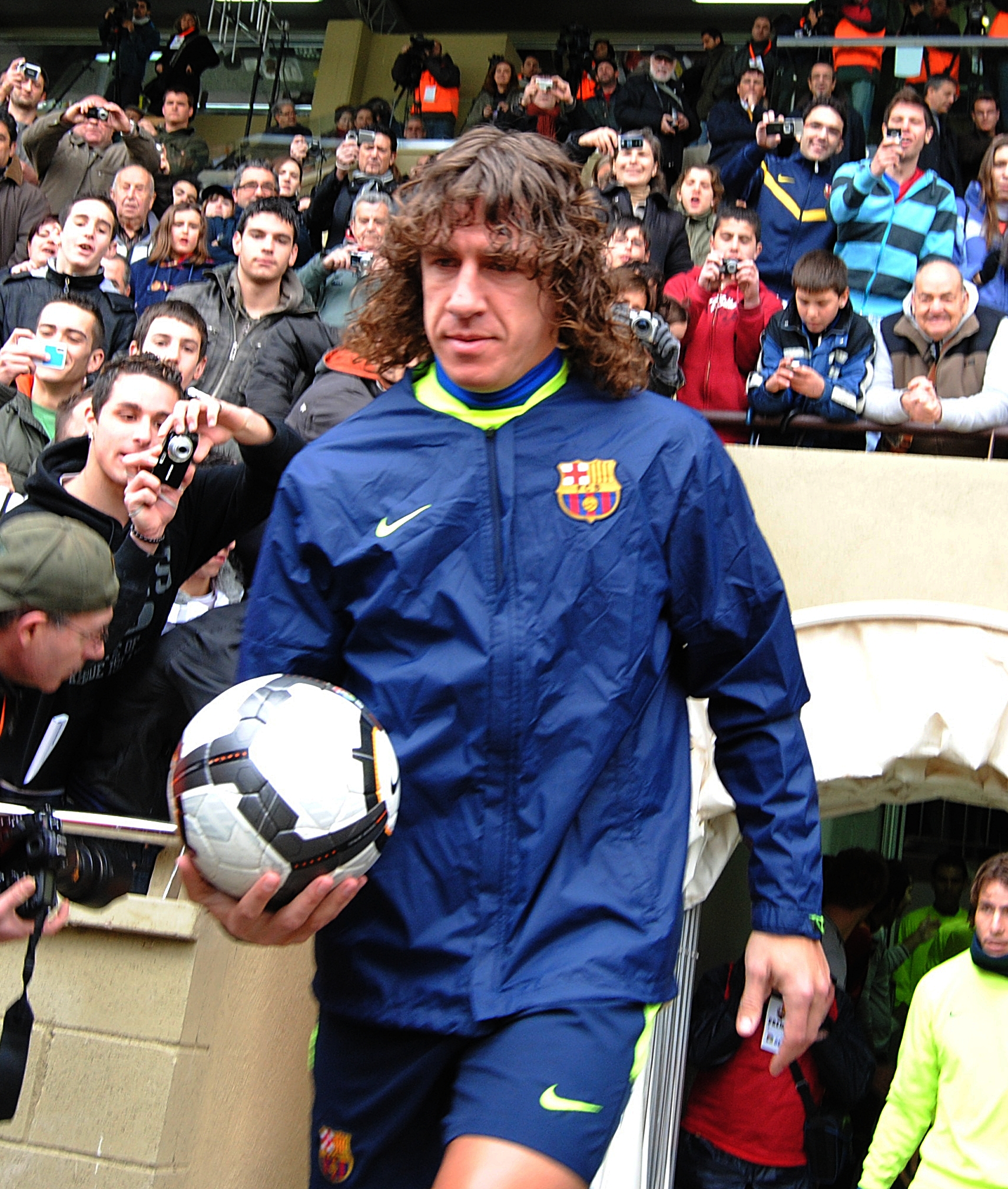 Carles Puyol - FC Barcelona